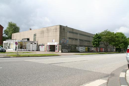 Hamburg, Drosselstraße, Mehrzweckanlage (MZA). Das Parkhaus, das auch als Bunker dient, wurde 1971 errichtet. (Siehe dort)